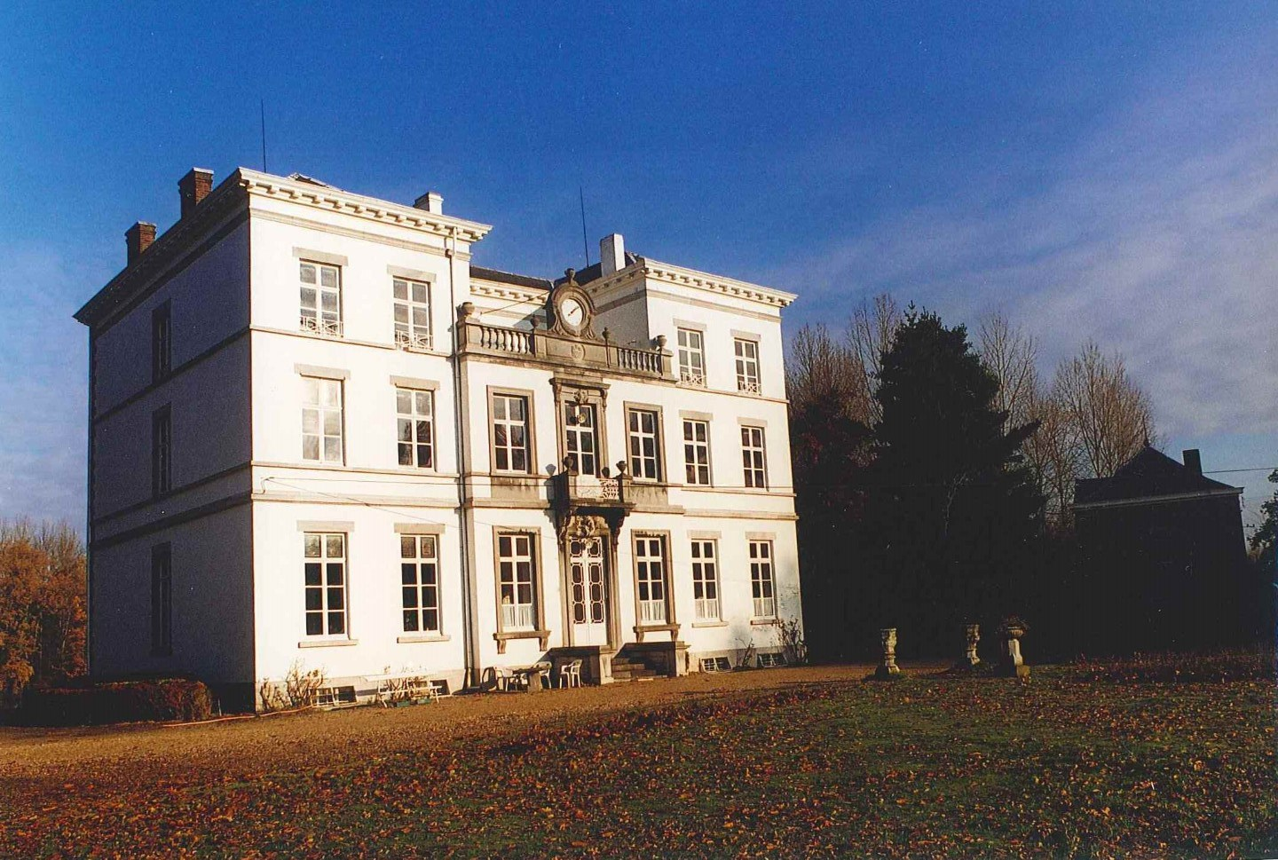 Kortessem Jongenbos 2-4